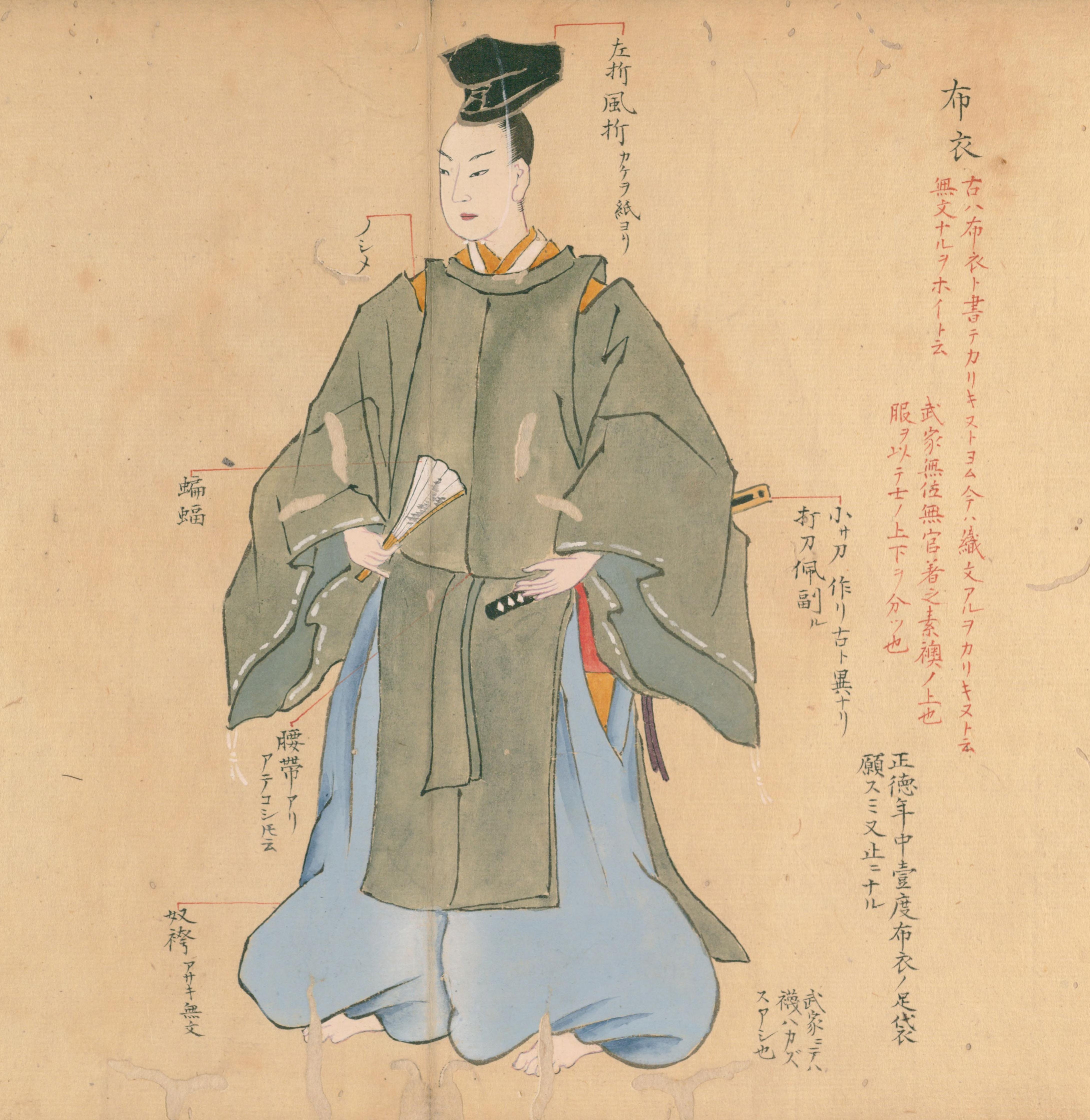 『装束着用之図』より、「布衣」の図。